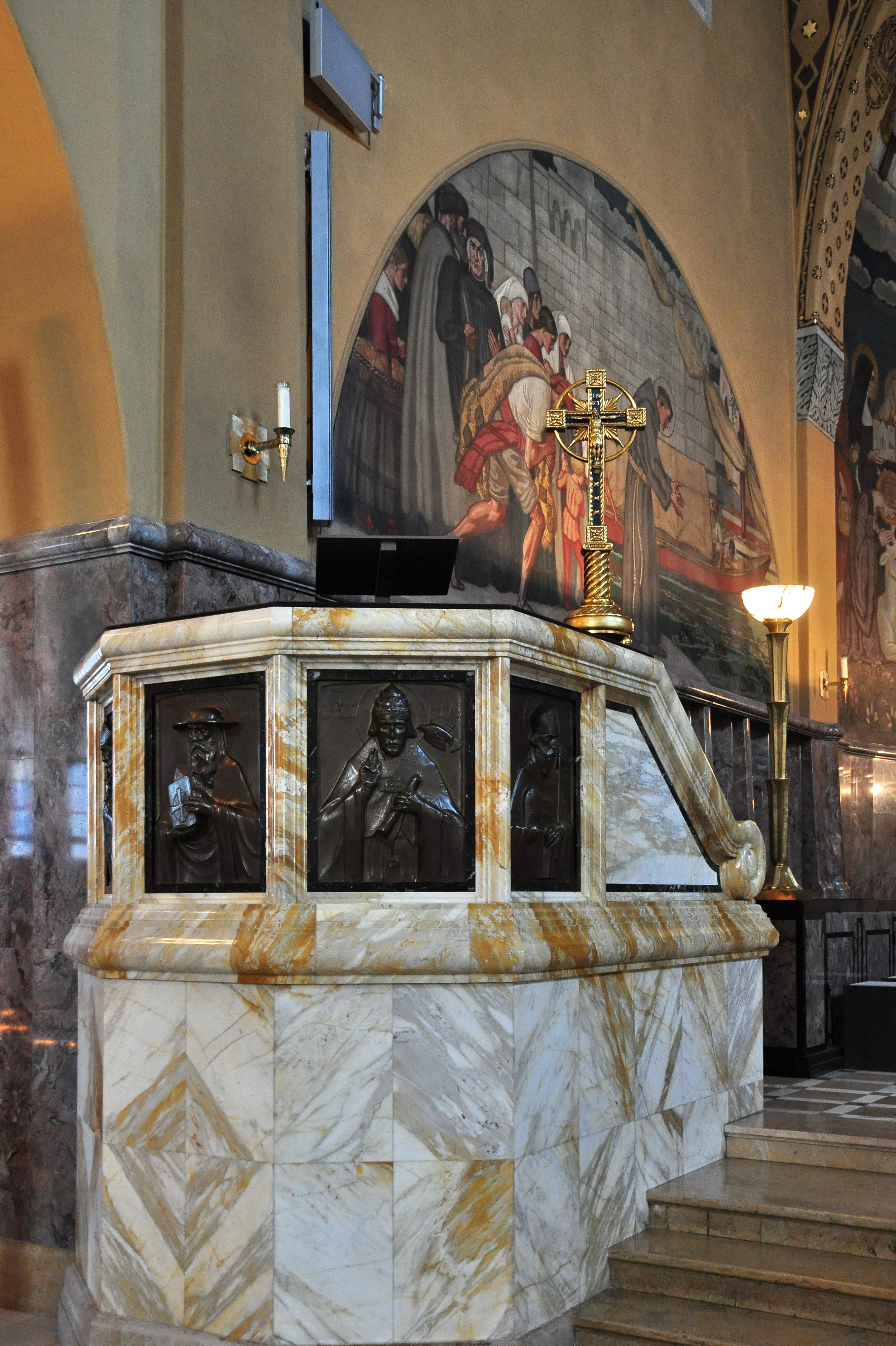 Katholische Kirche St. Antonius in Zürich-Hottingen (Switzerland), Kanzel, vier Bronzereliefs mit den Darstellungen der vier Evangelisten vom Bildhauer Andreas Kögler